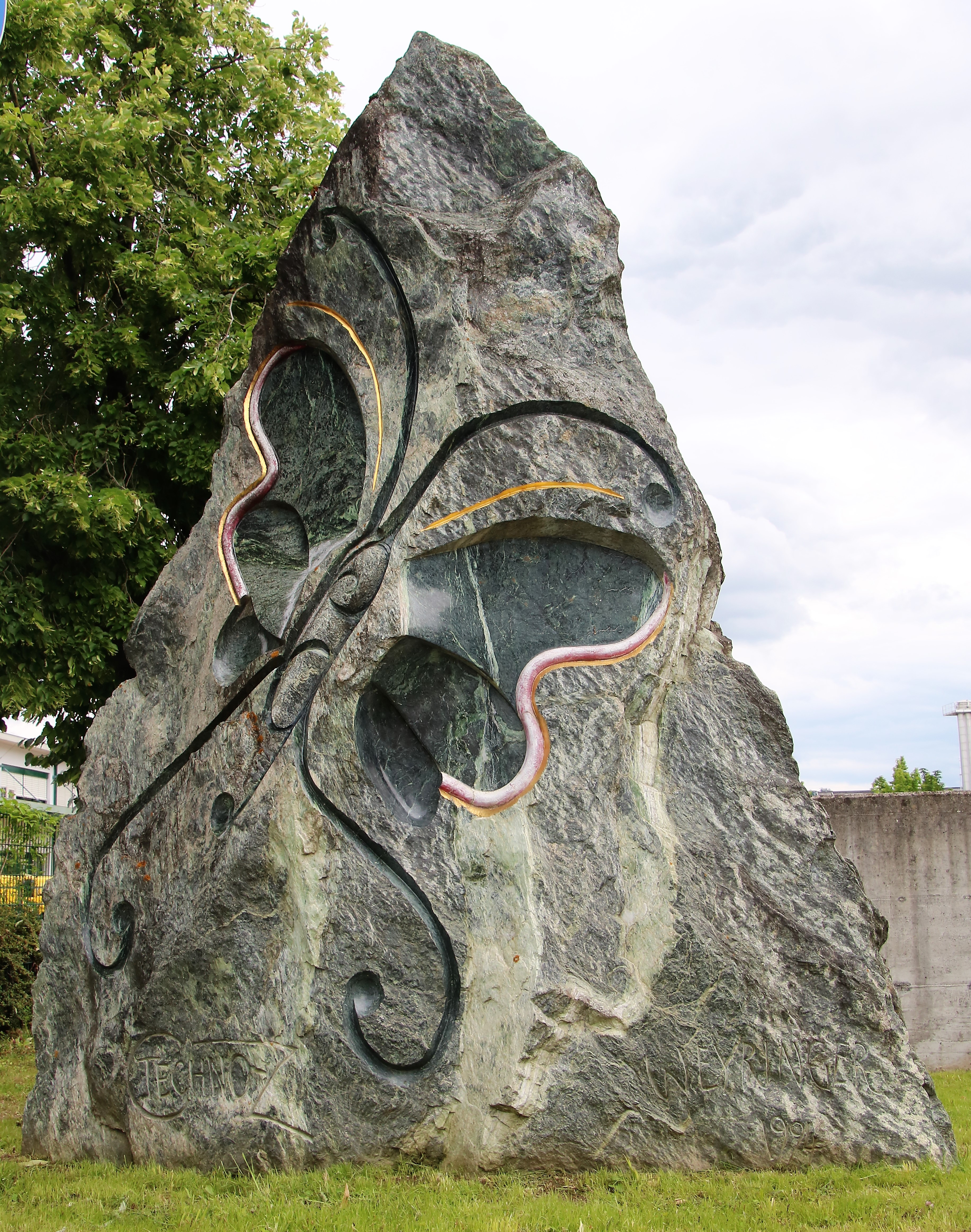 Skulptur im TechnoZ Salzburg von Johann Weyringer